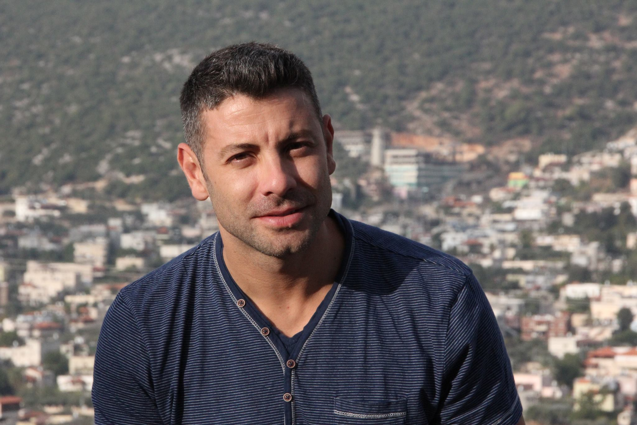 יחיא קאסם משדר מירושלים